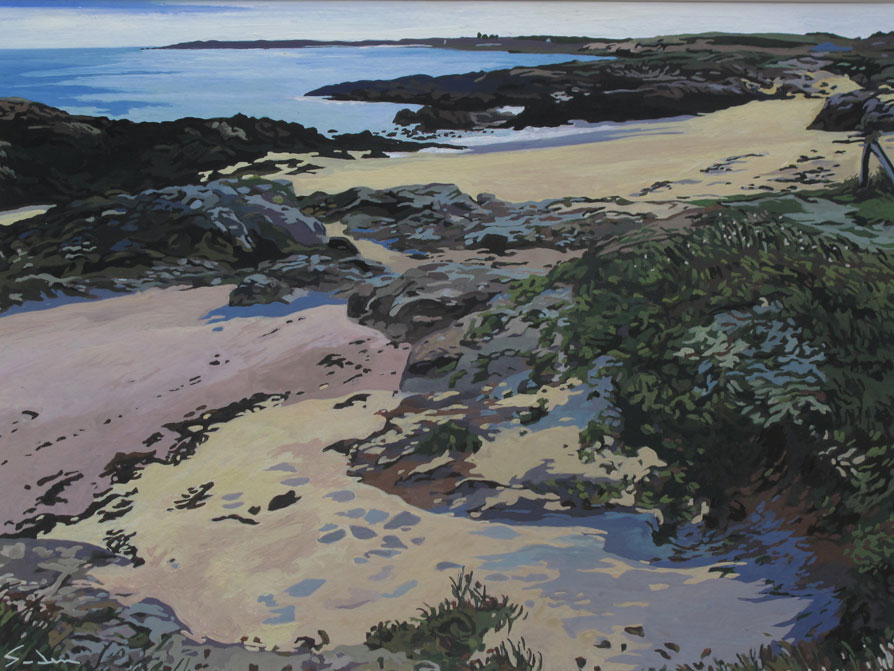 Hoedic